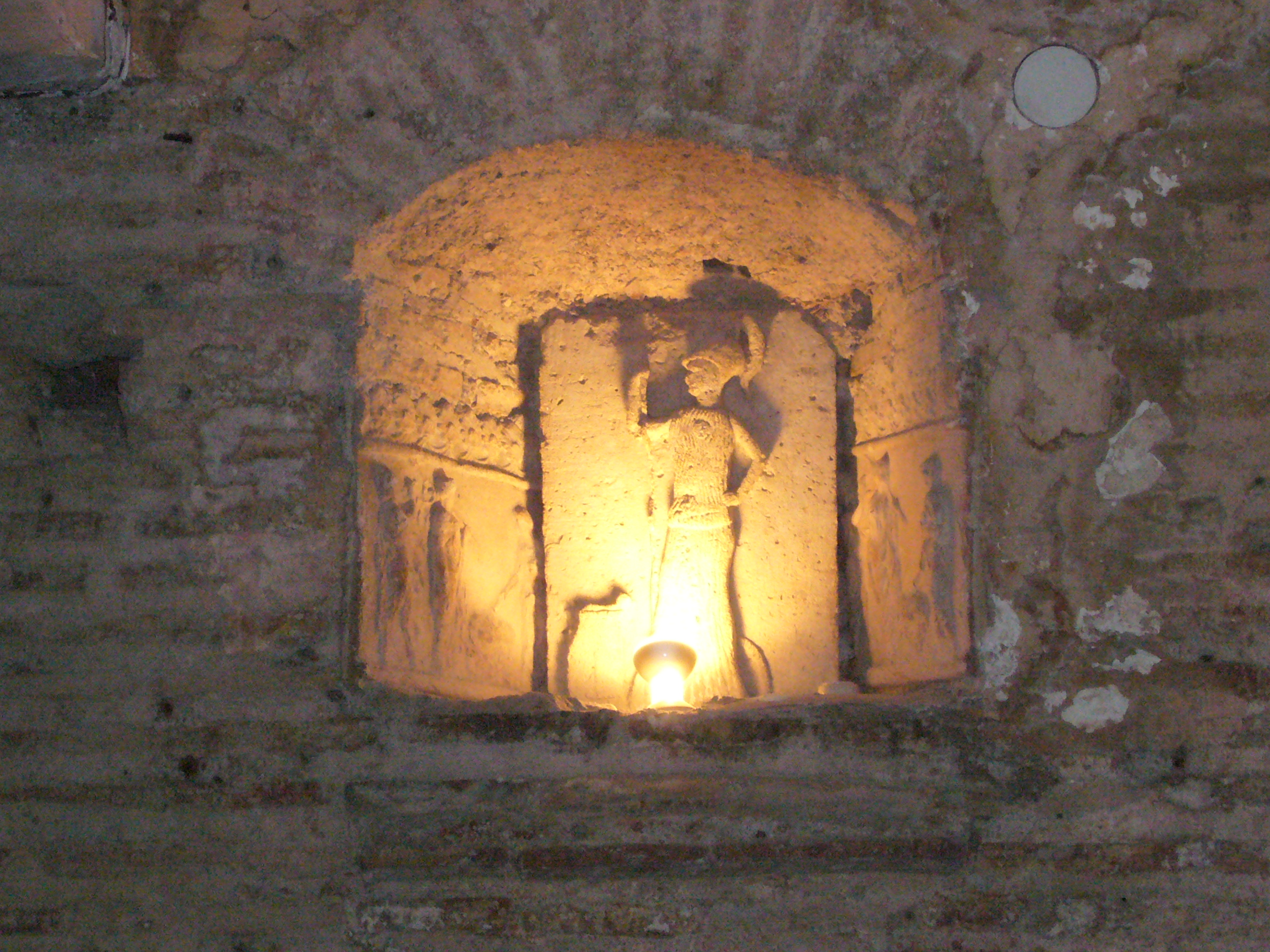 Roma, insula romana sotto Santa Cecilia in Trastevere: larario.